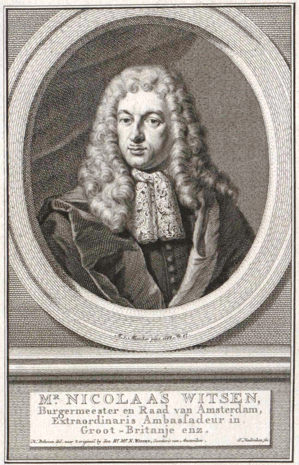 Nicolaas Witsen (1641–171), Stich von Jacob Houbraken nach Michiel van Musscher